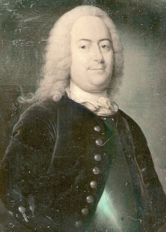 Portrait